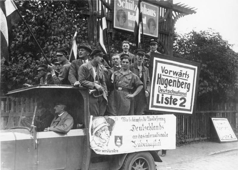 Reichstagswahl, Propaganda der DNVP Scherl: Wahlpropaganda-Umzug der Deutschnationalen in Neukölln, 32321-30 [Reichstagswahl 1930, Propagandaumzug der Deutschnationalen Volkspartei in Berlin-Neukölln mit antisemitischem Plakat]